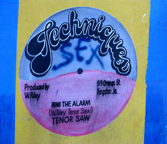 Foto: Dubdem e FabDub.